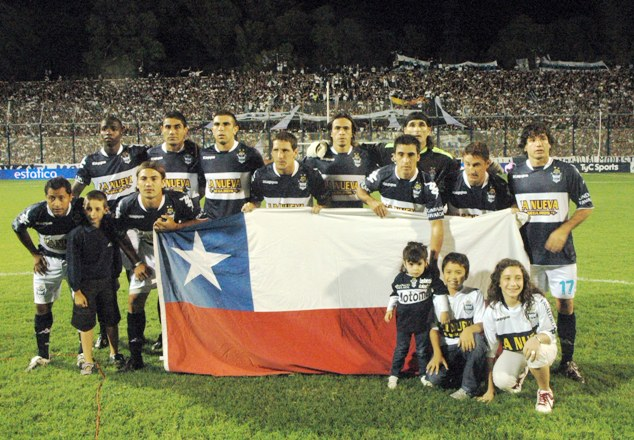 Formación de Gimnasia y Esgrima La Plata, en el partido frente a River Plate del Torneo Clausura 2010, posando con la bandera chilena en homenaje a las víctimas del sismo ocurrido en ese país el 27 de febrero de 2010. Arriba: Marco Pérez, Agüero, Straqualursi, Aued, Maldonado, Sessa, Ormeño, Graf y Romero; abajo, Encina y Rinaudo.